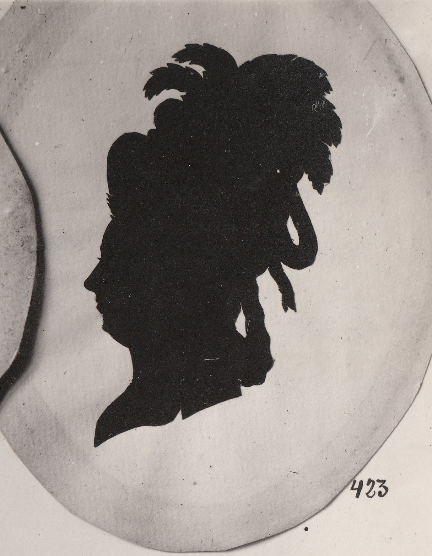 Format: Fotopositiv Dato / Date: 1897 Fotograf / Photographer: Erik Olsen (1835 - 1920) Sted / Place: Trondheim Oppdatert / Update: 27.01.2016 [lenke til Geni] Geni: Margrethe Sehested (1758 - 1838) Eier / Owner Institution: Trondheim byarkiv, The Municipal Archives of Trondheim Arkivreferanse / Archive reference: Tor.H41.B41.F3029 Utstillingstekst i Trondhjems 900 Aars Jubilæum: Katalog for Den Historiske Udstilling i Trondhjem 1897: 423. Sehested, ......, No. 422's [Frantz Wilhelm Sehested 1722 - 1787] Datter af første Ægteskab. G. m. No. 424 Theodor Georg von Schlanbusch (1756 - 1829). Silhouet, taget 1782. Konsul Just Finne.